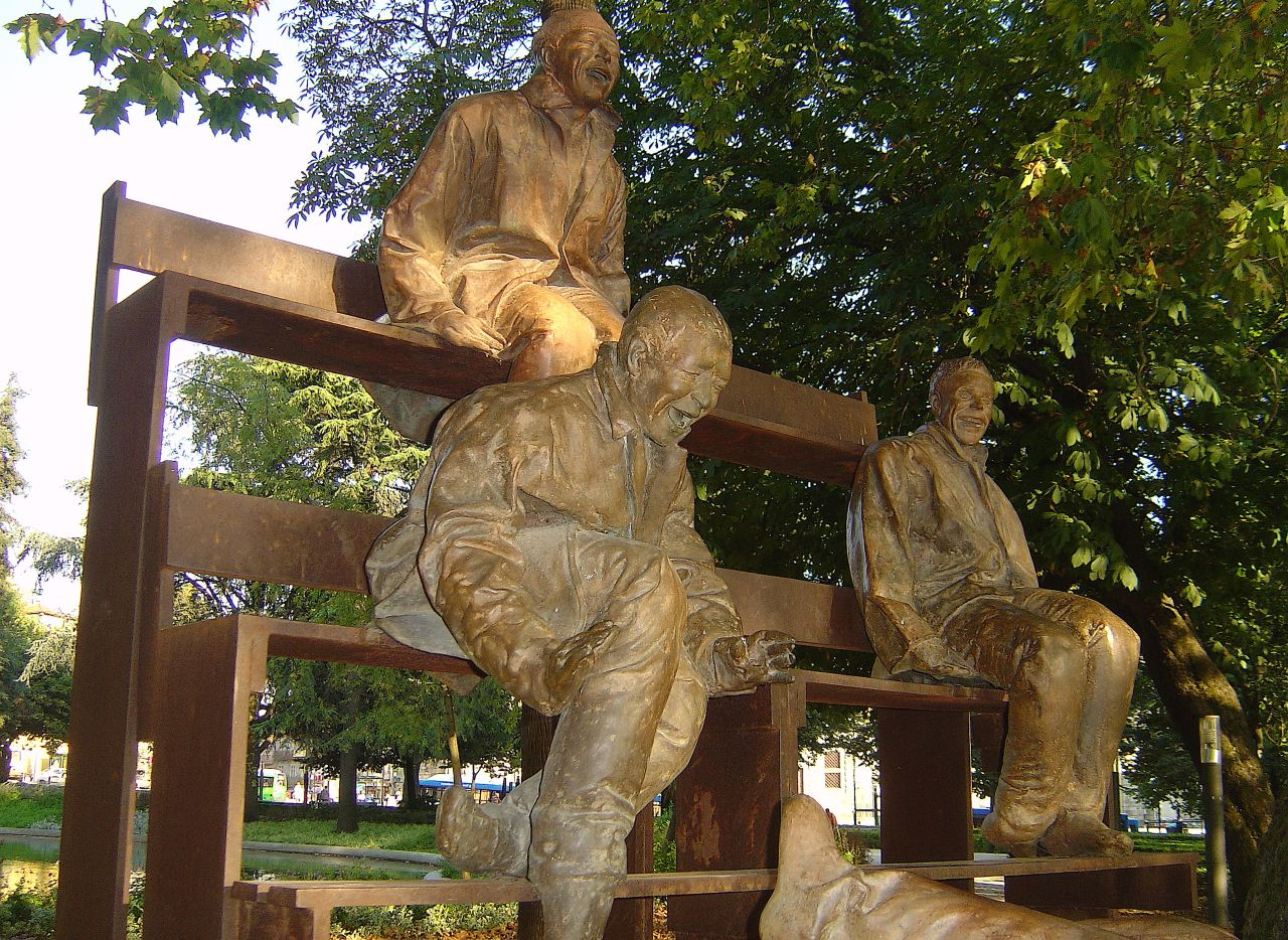 LOL...